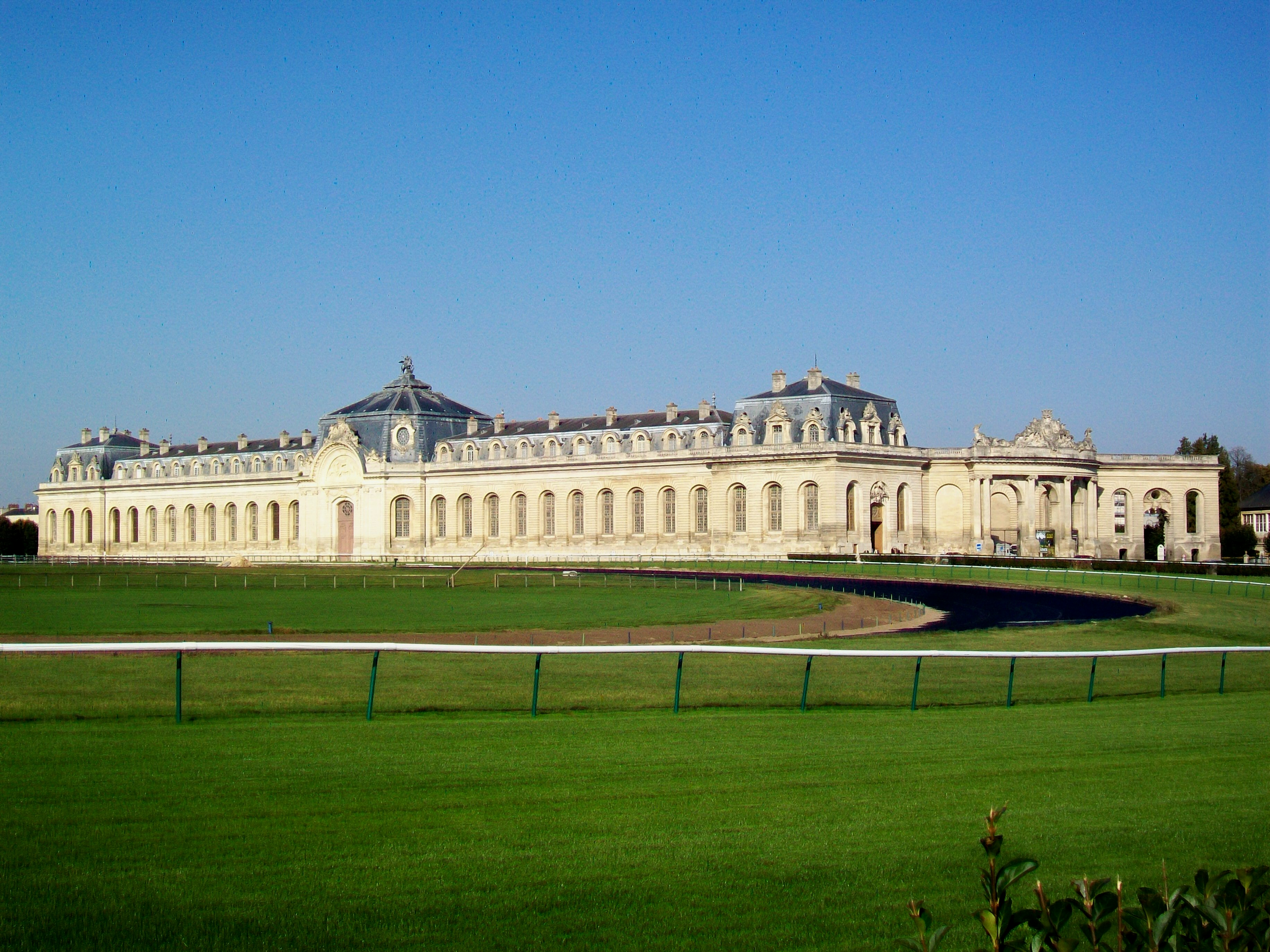 Les Grandes écuries, vue d'ensemble depuis le sud-est.